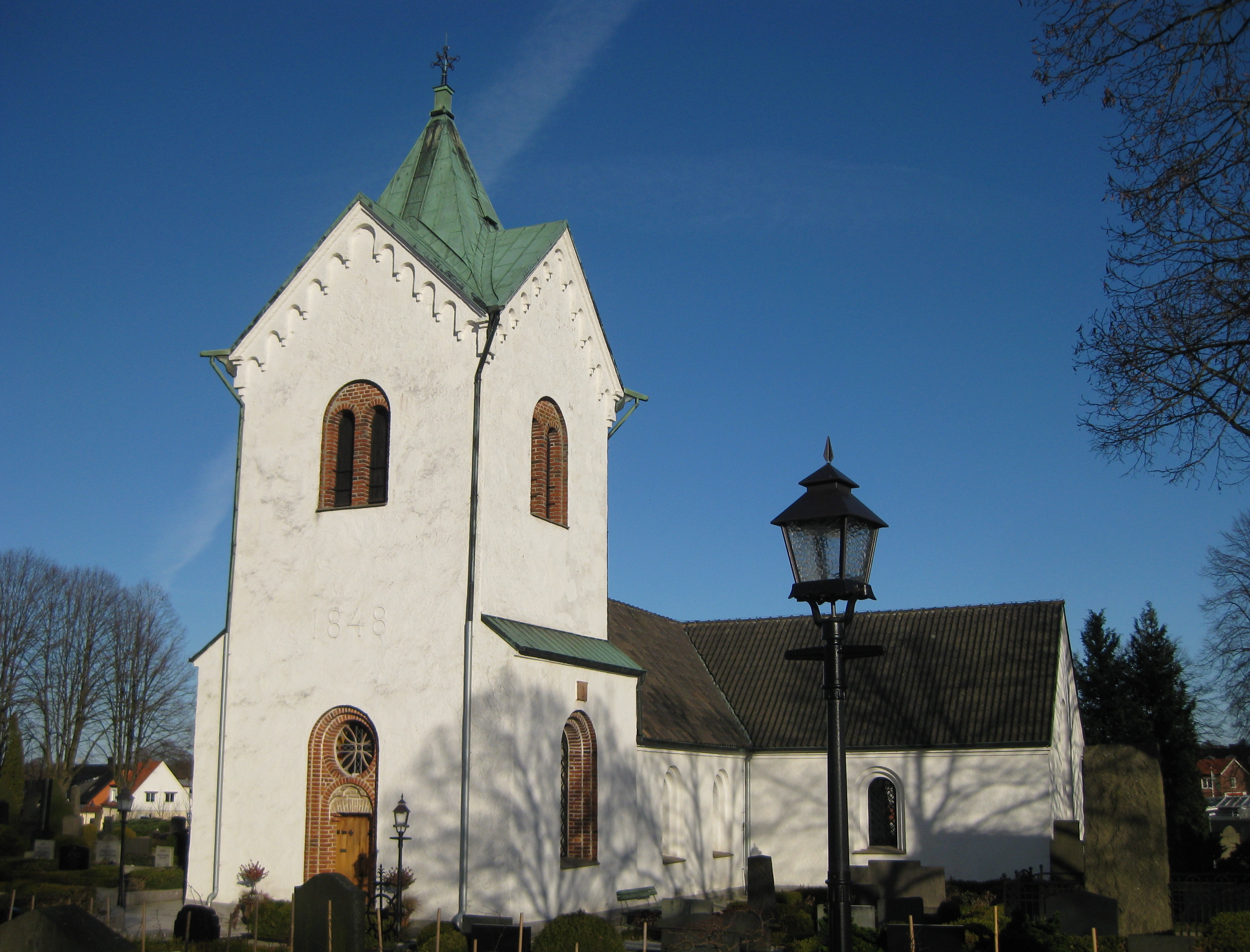 Veberöds kyrka i Skåne